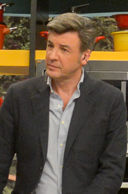 Ministro Marelo Díaz visita el programa Muy Buenos Días